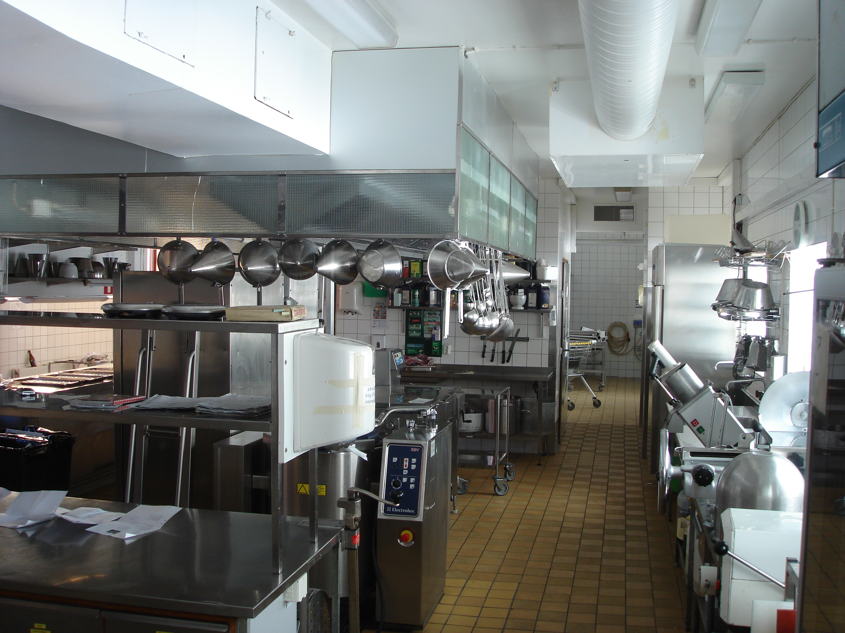 Photo of Stora köket at norrlands nation, Uppsala.